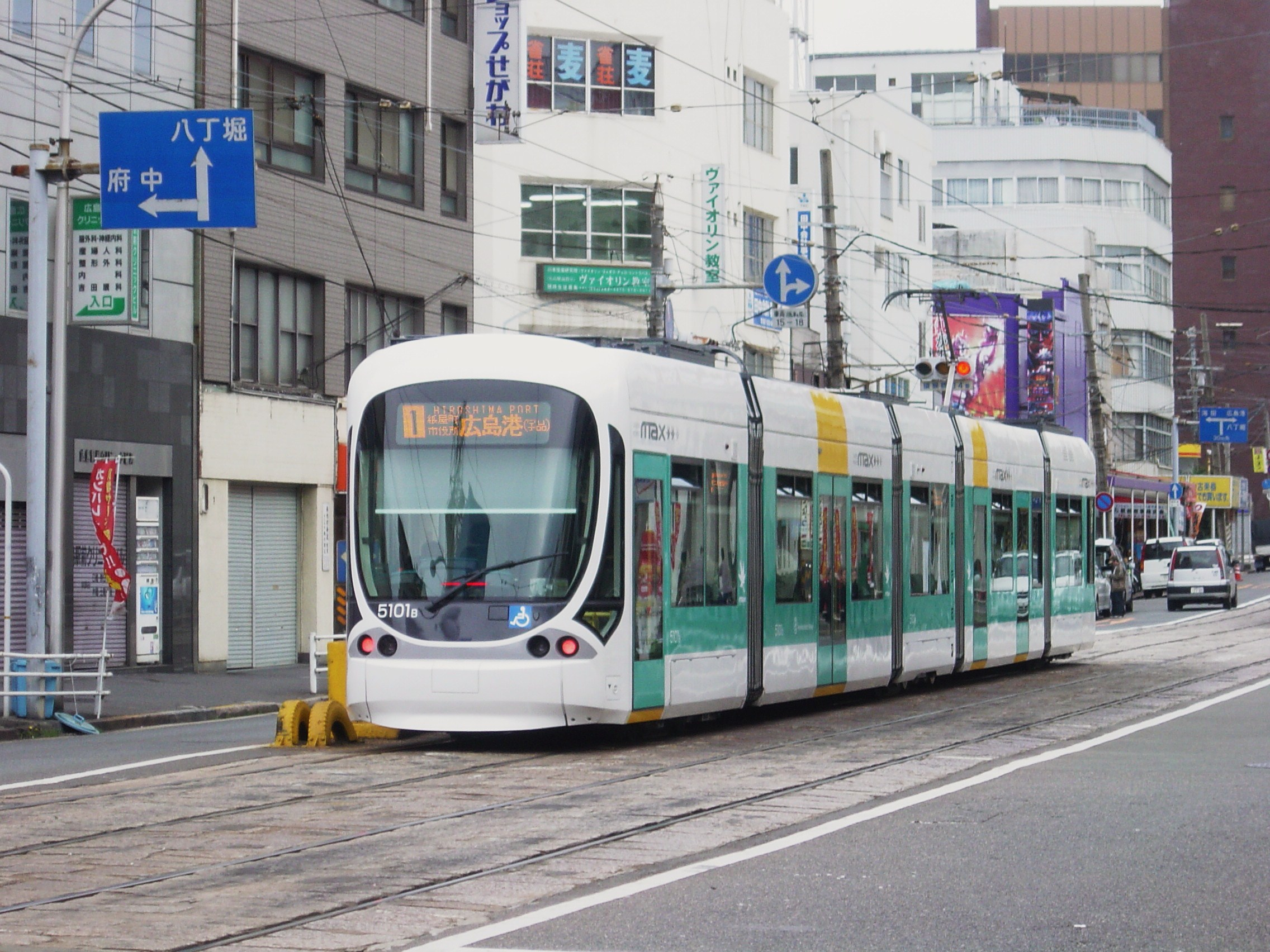 広電5100形路面電車 （2005年4月本人撮影）